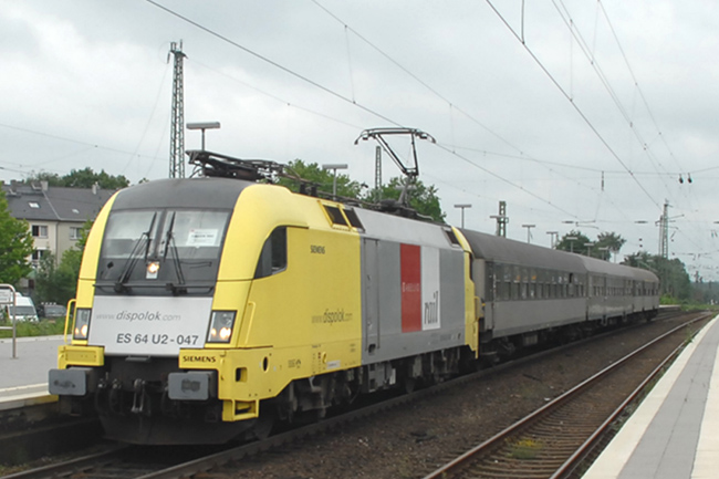 Dispolok ES 64 U2 047 (vermietet an Abellio) mit RB 40 der Abellio Rail in Bochum Hbf